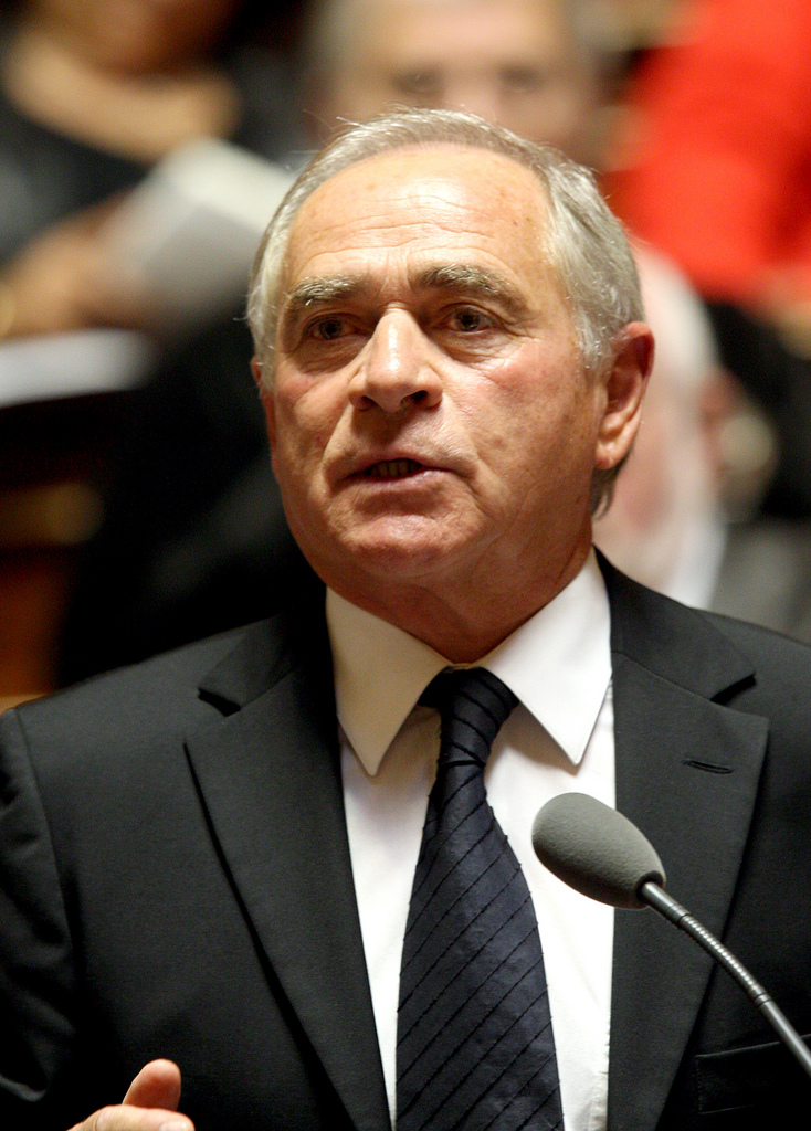 François Patriat, homme politique français. Question au Gouvernement, à Mme Michèle Alliot-Marie, Ministre de l'Intérieur